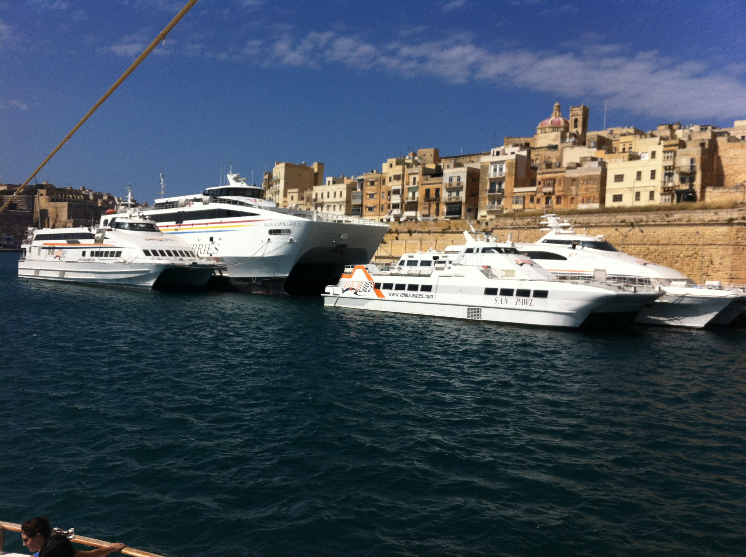 Ir - Rampa Ta' L - Isla, L-Isla, Malta